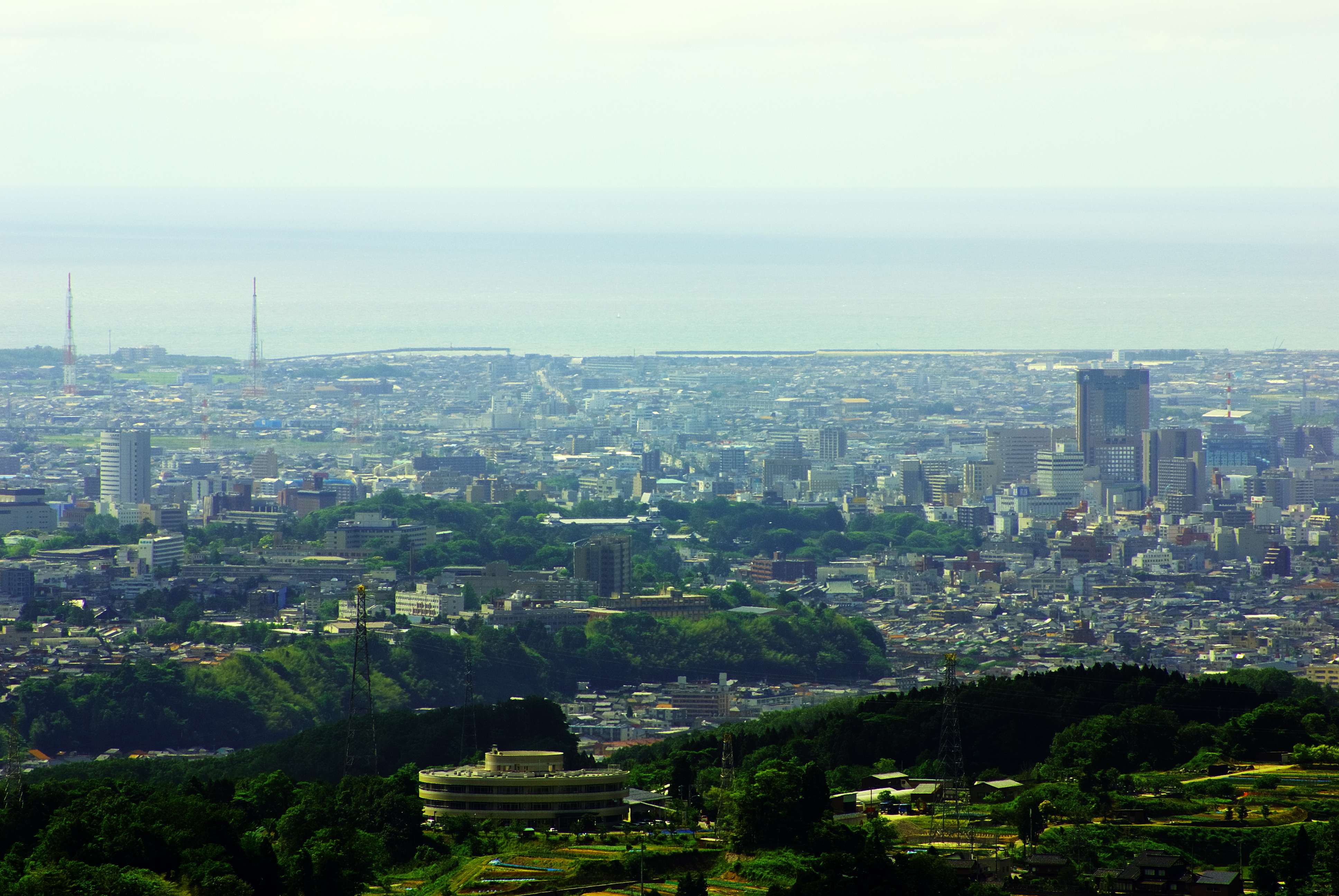 キゴ山からみた石川県金沢市街